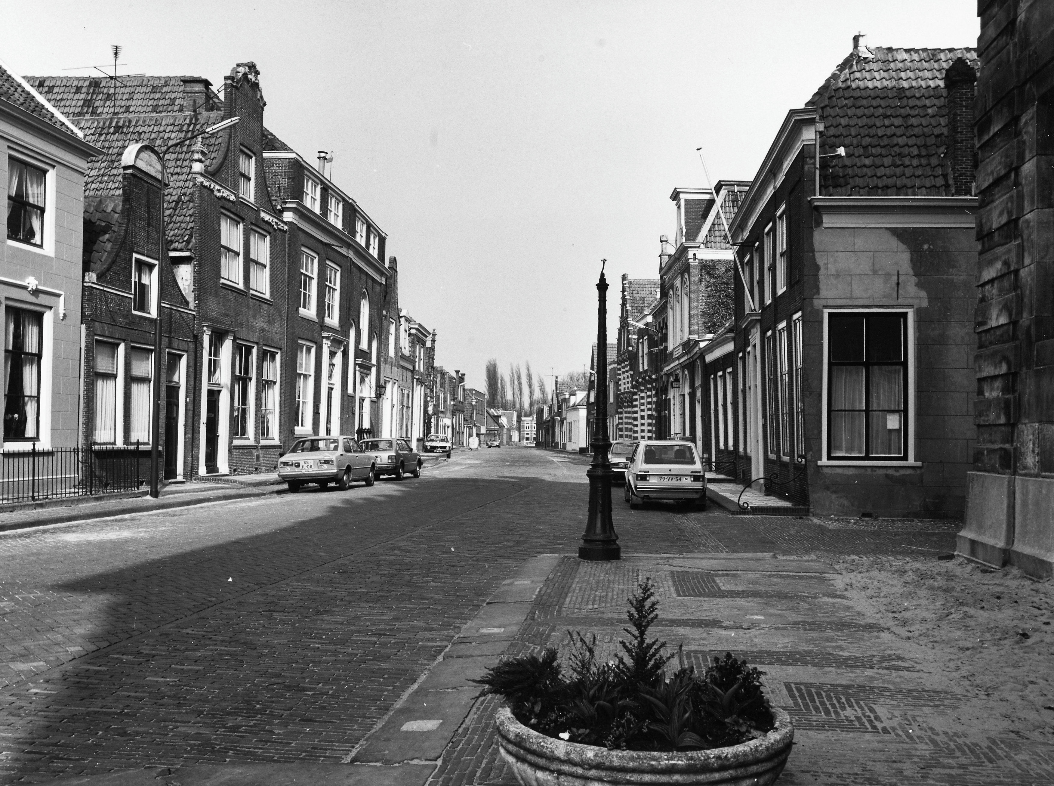 Plattegronden en Overzichten: Breedstraat naar het noorden vanaf stadhuis (opmerking: Neg. in 2003 verloren door contact met Glucol)